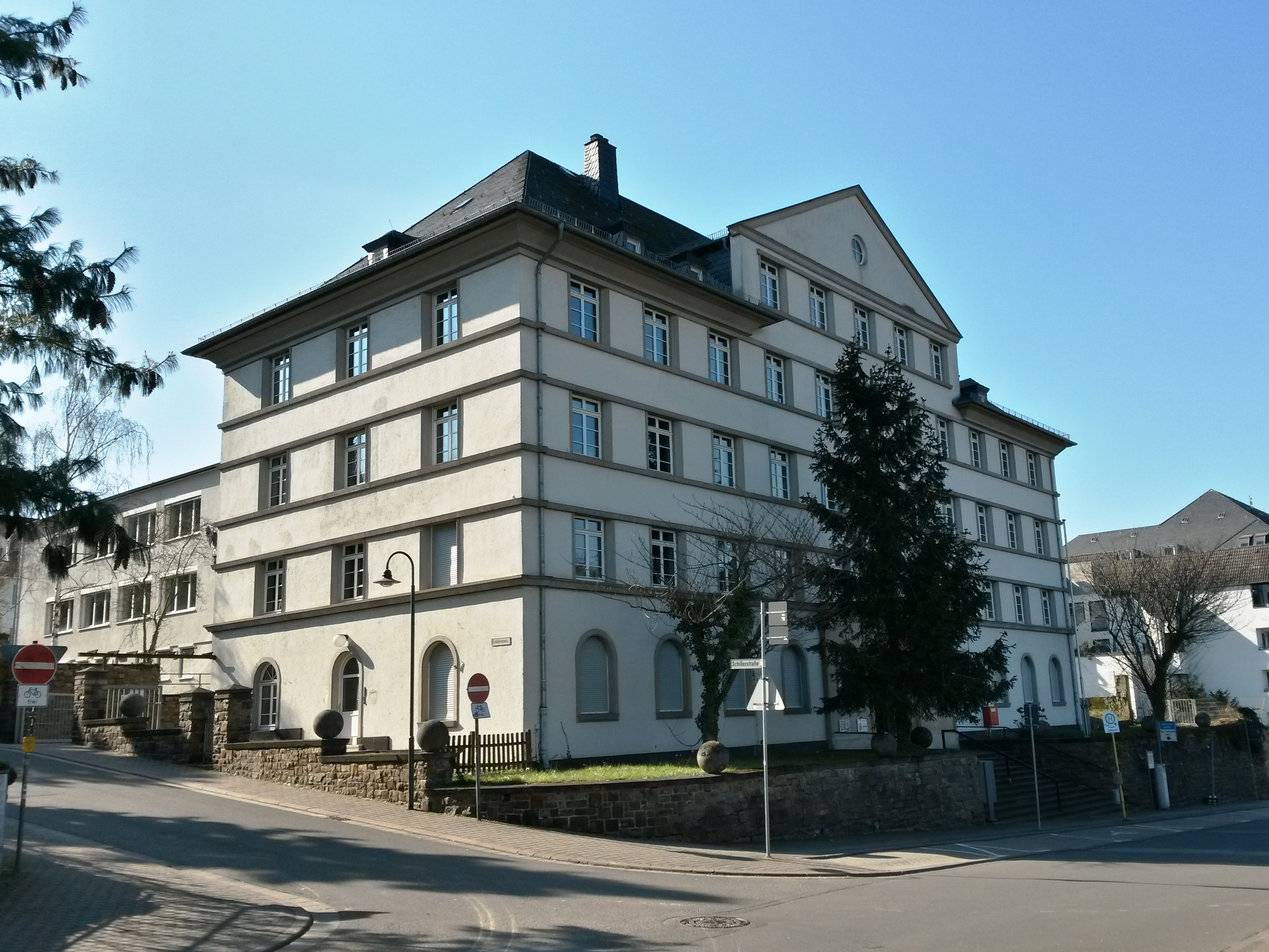 Finanzamt in Bingen am Rhein, Rochusallee 10: viergeschossiger klassizierender Walmdachbau, 1927, Architekt Friedrich Lauer, Darmstadt. Ansicht von Nordosten.